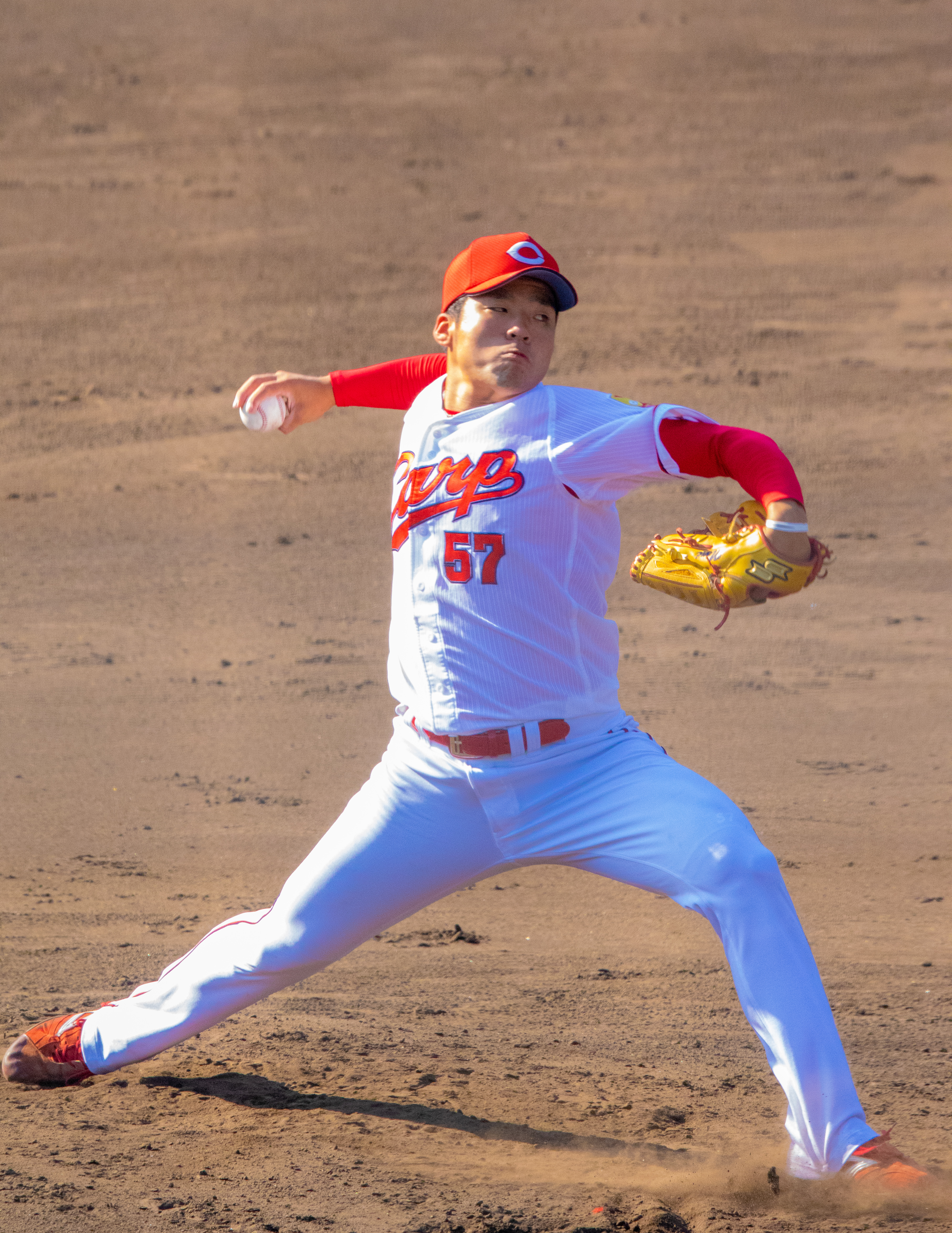 2019年11月9日天福球場